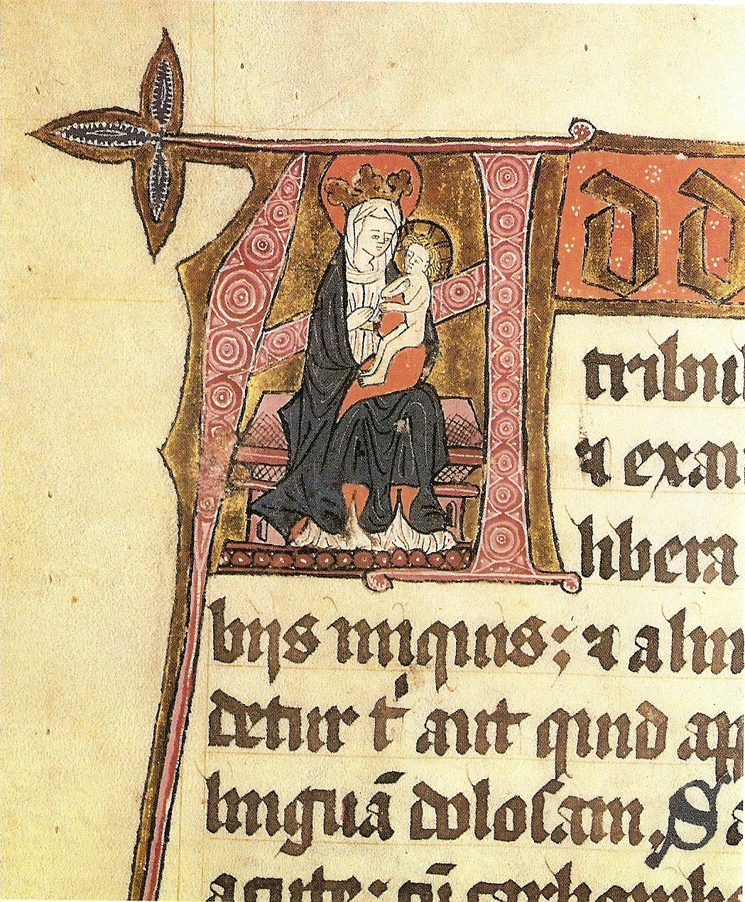 Jungfrau mit Kind. Buchstabe "A" aus dem 120. Psalm "Ad dominum ...", gemalt von der Nonne Birgitta Sigfusdatter im Birgittenkloster Munkeliv in Bergen (Norwegen). Kodex des Domkapitels von Prag (Sign. B IV/I) Archiv Pražského hradu, Prag.